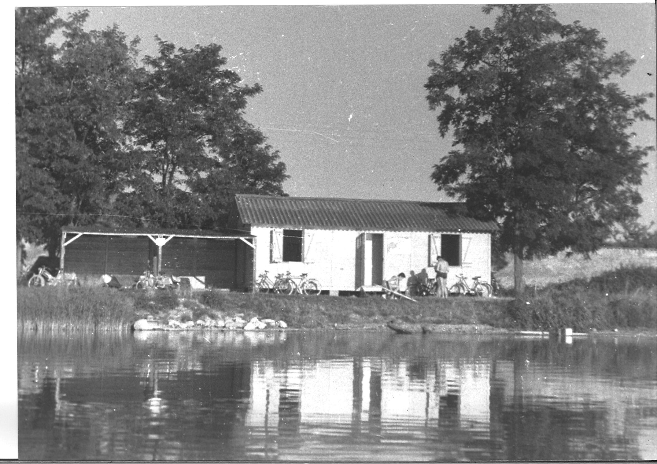 Premier bâtiment du club Aviron Majolan, 1958